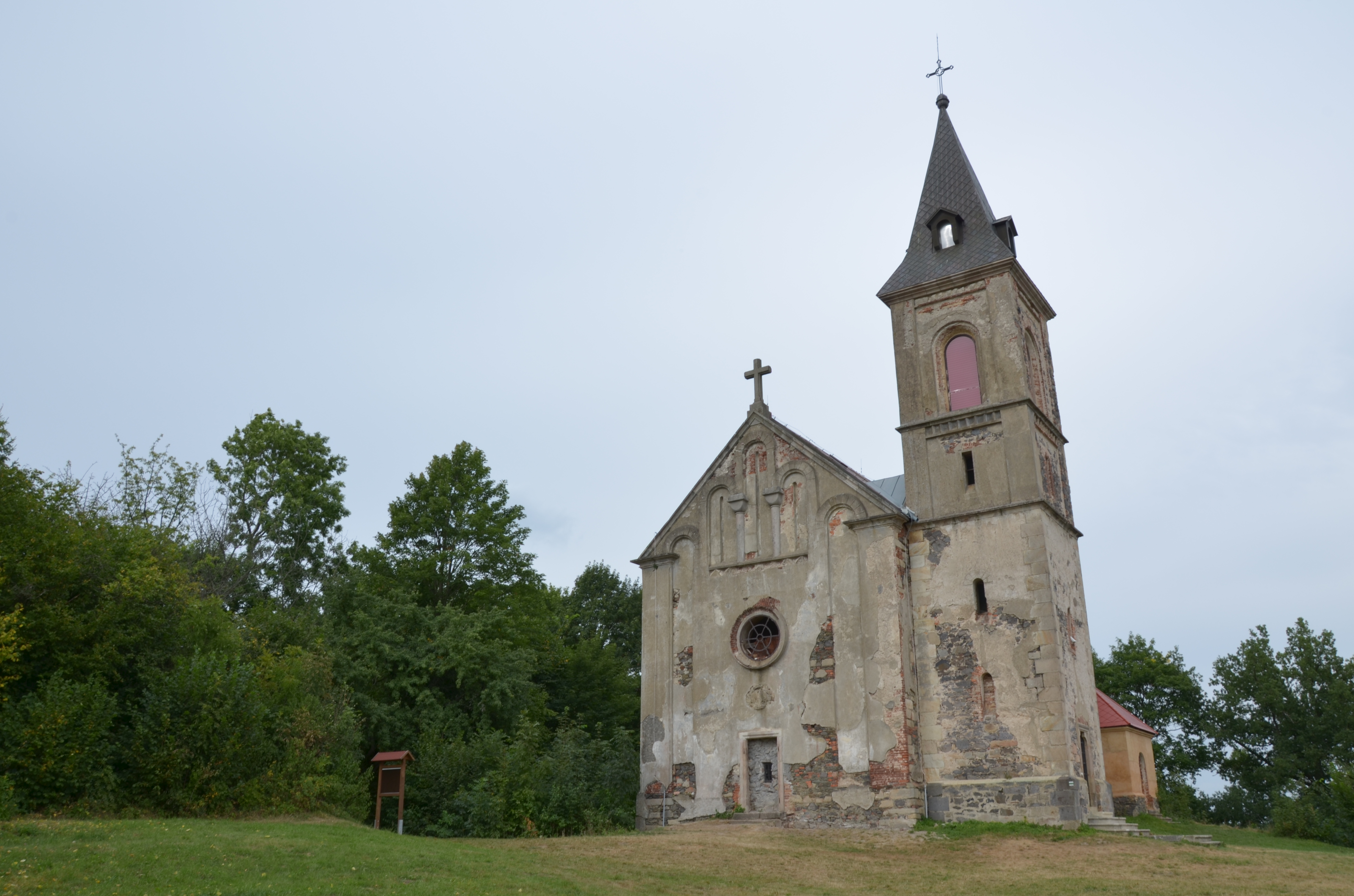 kostel sv. Máří Magdalény